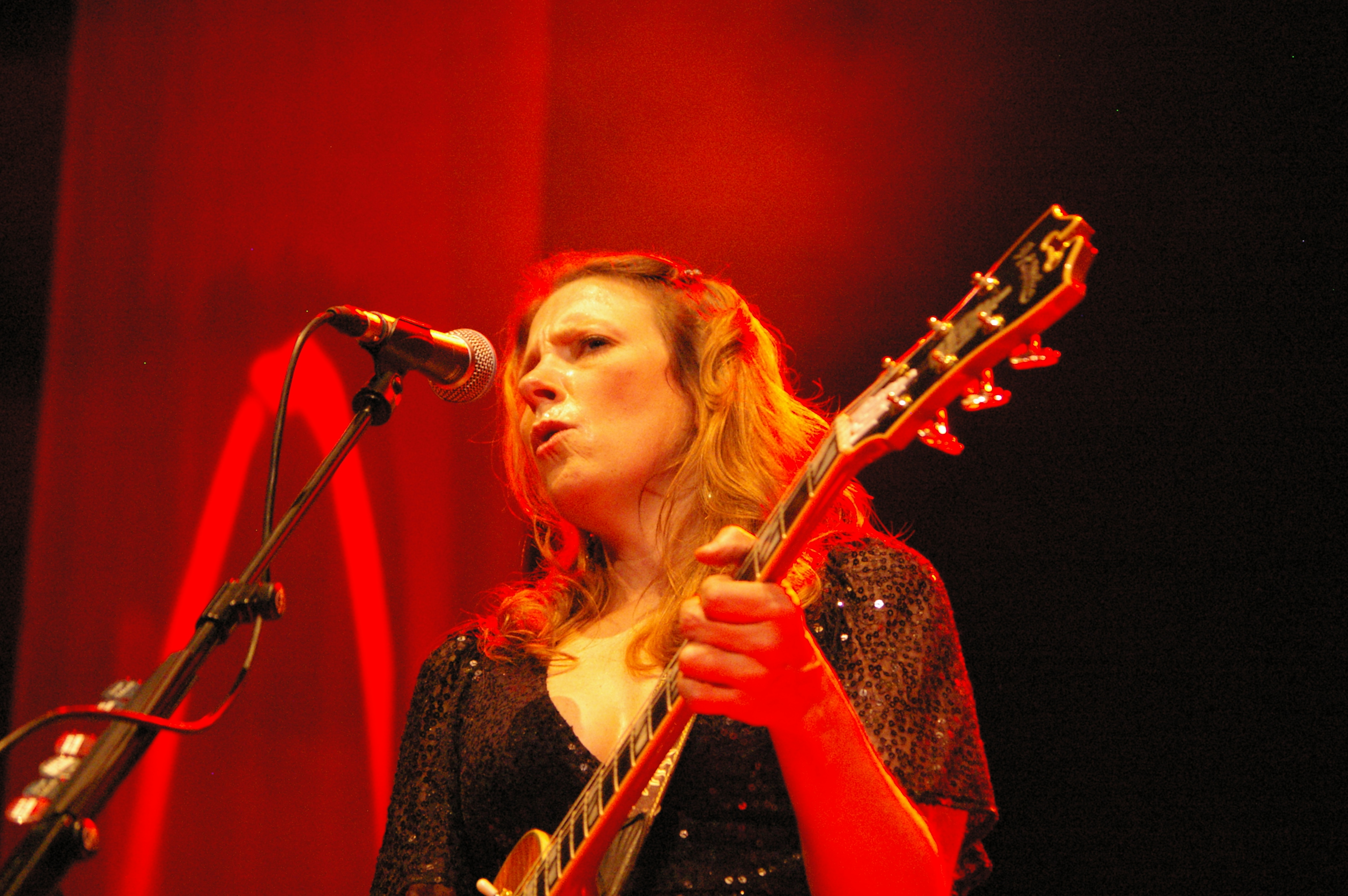 Live im Wiener Konzerthaus 17.7.2009 als Vorprogramm zu B.B.King